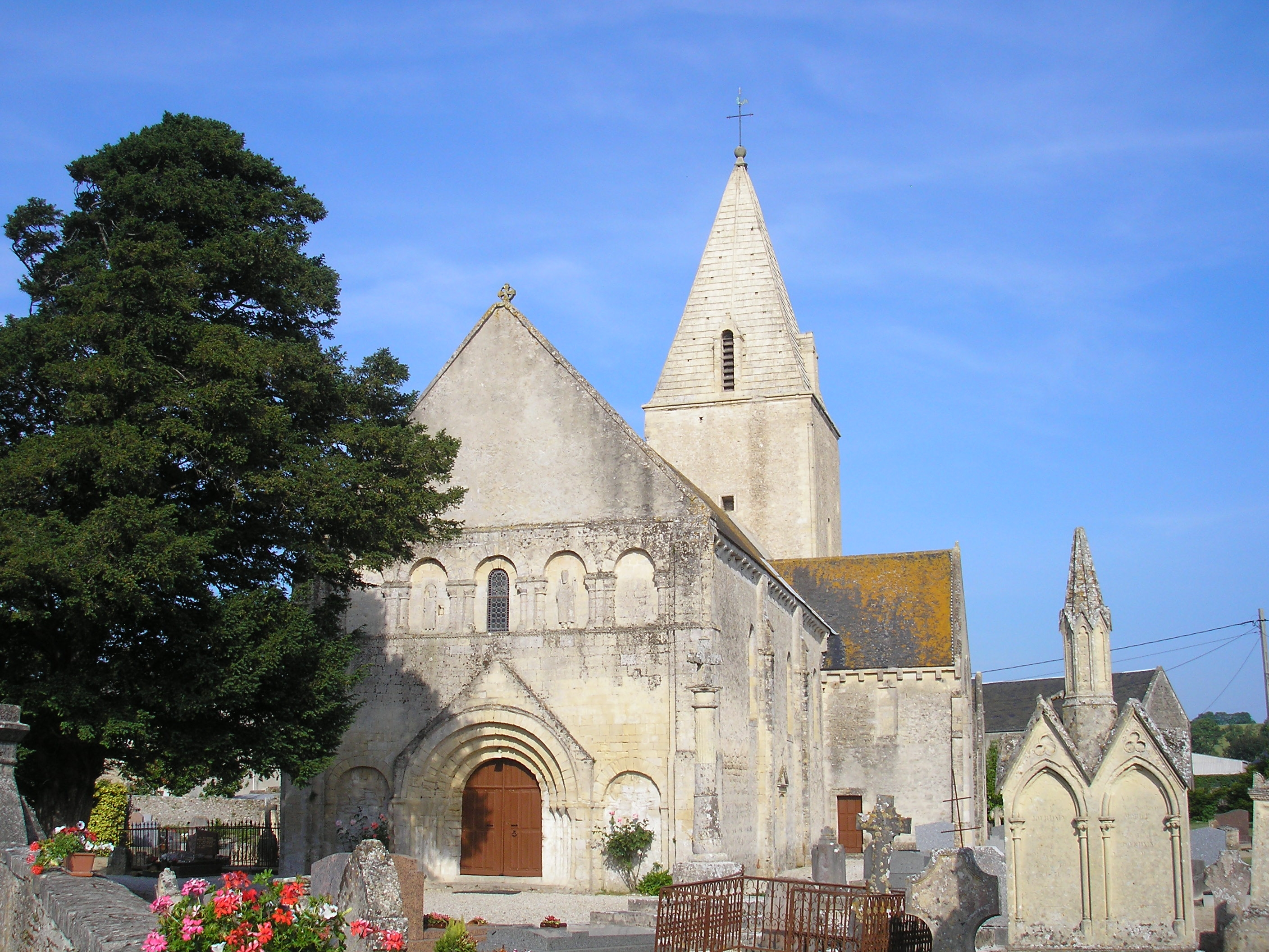 Meuvaines (Normandie, France). L'église Saint-Manvieu.